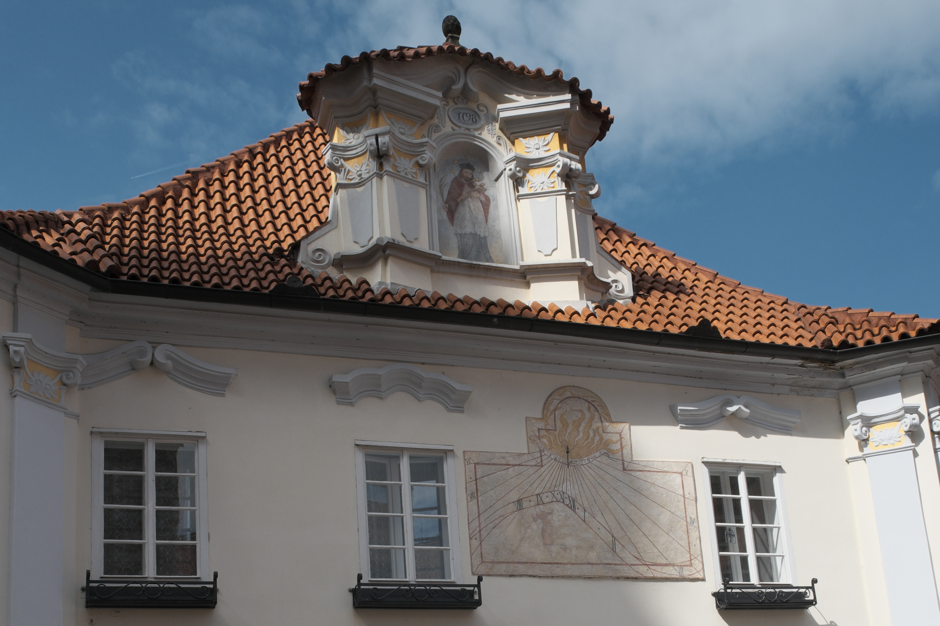 Pfarrhaus in Pelhřimov in der Region Hochland (Kraj Vysočina) in Tschechien